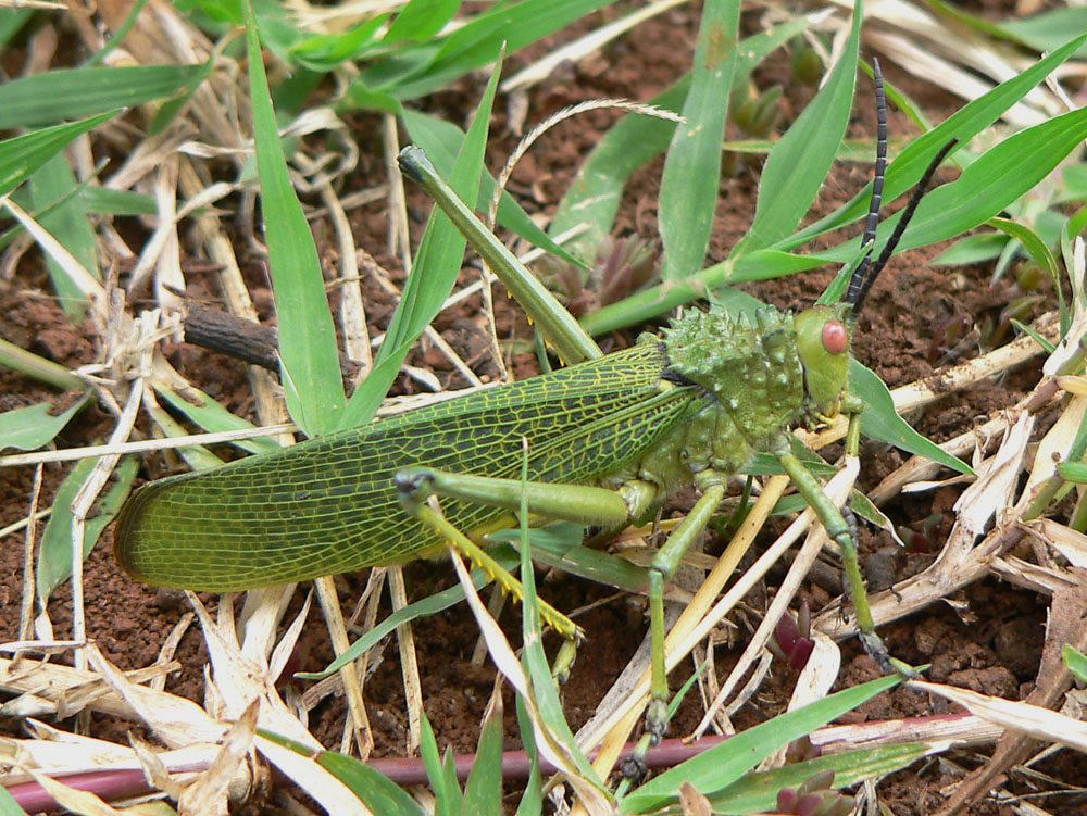 Photograph taken by Christiaan Kooyman on 21 December 2005 in Nanyuki, Kenya.